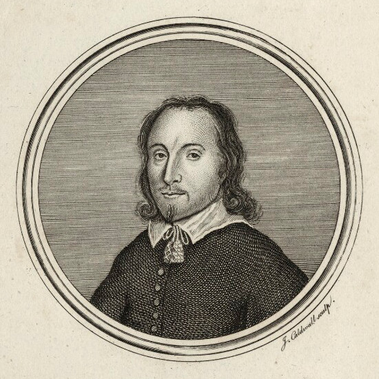 John Hilton (Komponist), (* ca. 1599, vermutlich in Cambridge; † 1657). Zeitgenössischer Stich des 17. Jahrhunderts.